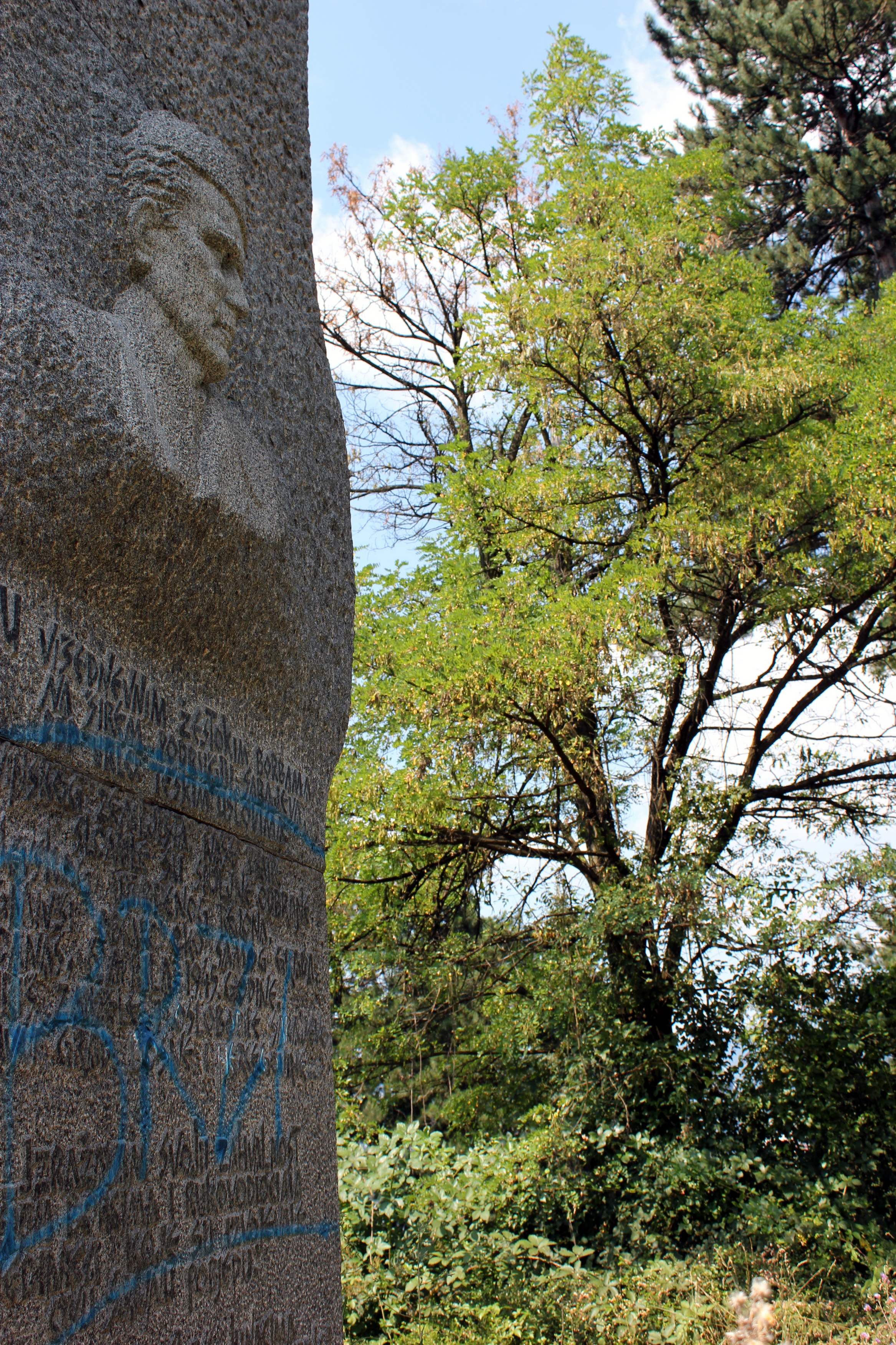 Denkmal im Spomen-park Vraca im Südwesten von Sarajevo.